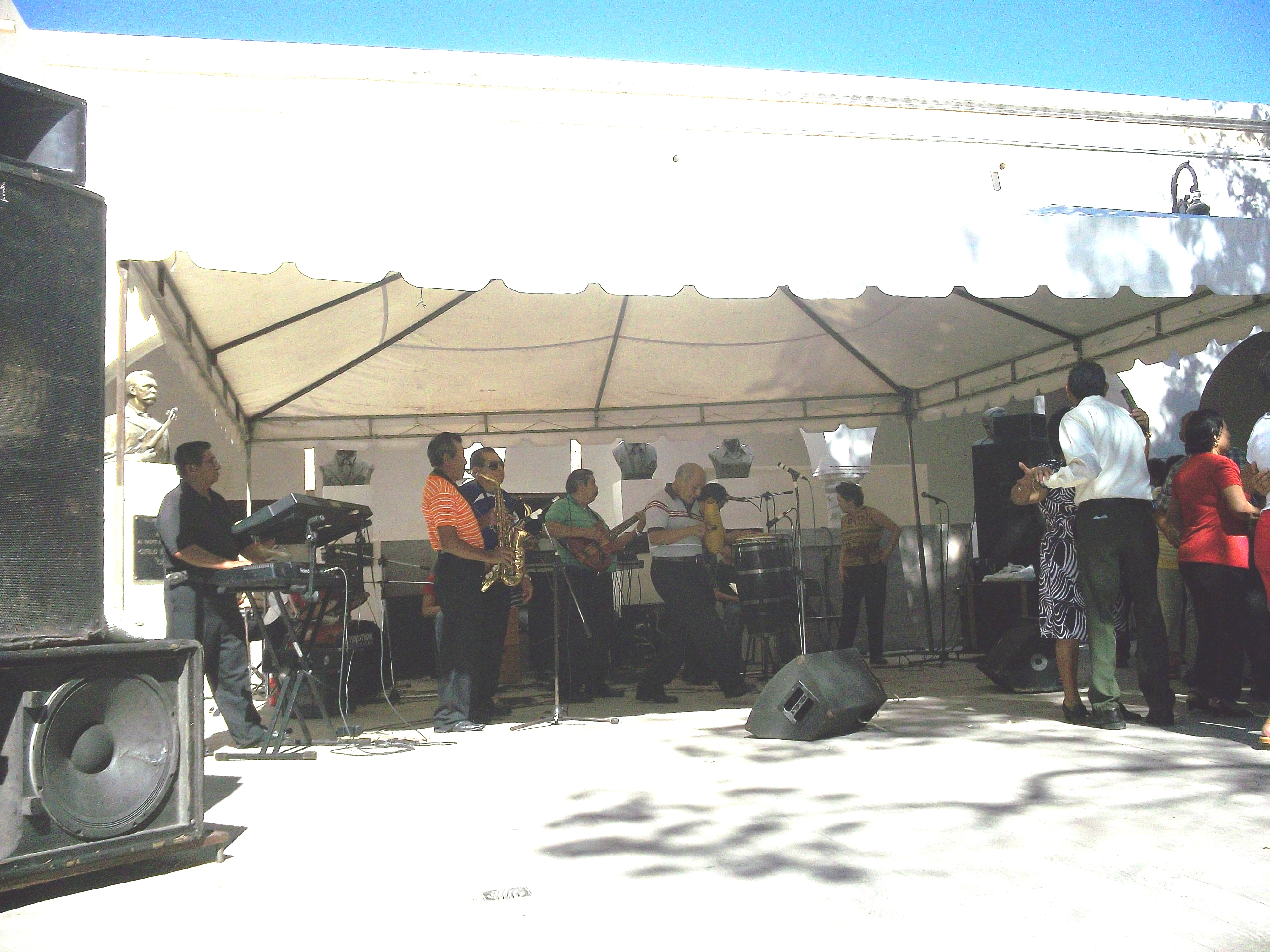 El grupo musical de música tropical "Chicken y sus Comandos" amenizando un baile popular en Mérida, Yucatán. Entre sus éxitos musicales se pueden mencionar: Cozumel, Verano en Veracruz, Elsa y varios más. La grupación está integrada por Israel Valle Cámara, Israel Flores Peraza, Tedy Valle Lesiano y Rafael Rodríguez Aguilar. Esta fotografía fue tomada con su consentimiento por lo que no estoy violando derechos de autor ni de personalidad.